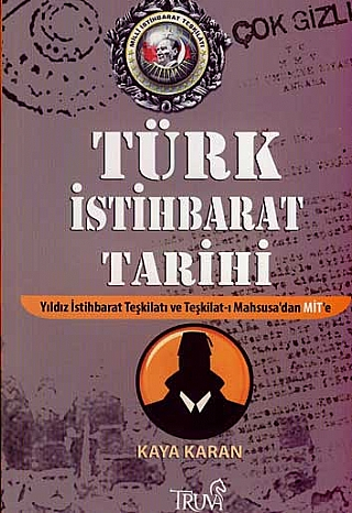 Kaya Karan. Türk istihbarat tarihi: Yıldız İstihbarat Teşkilatı ve Teşkilat-ı Mahsusa'dan MİT'e. Truva Yayınları, 2008, 256 s.